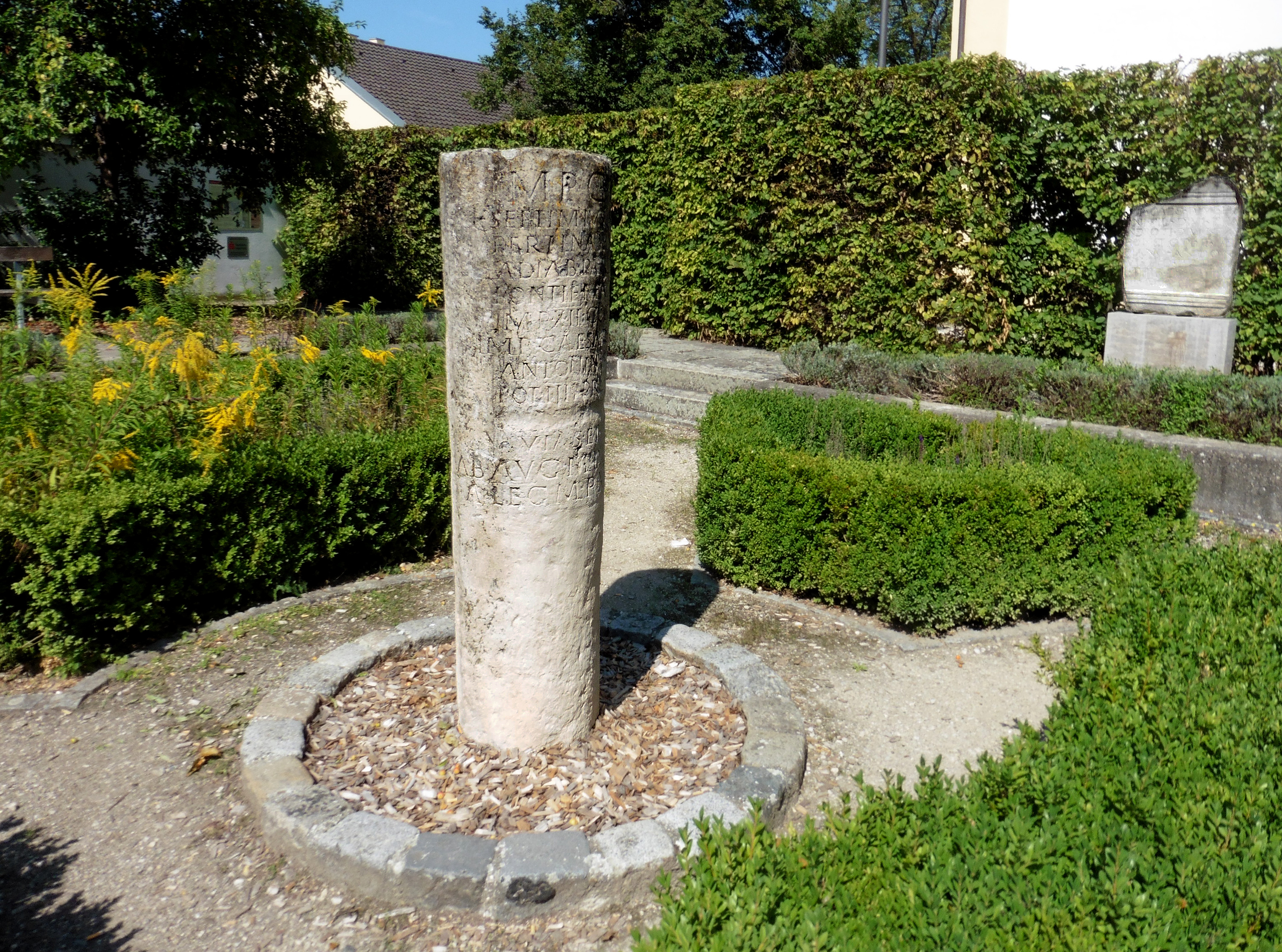 CIL XVII4, 00070 Imp(erator) Caesar L(ucius) Septimius Severus Pius Pertinax Aug(ustus) Arab(icus) Adiab(enicus) Parthicus maximus pontif(ex) max(imus) trib(unicia) pot(estate) VIIII imp(erator) XII co(n)s(ul) II p(ater) p(atriae) proco(n)s(ul) et Imp(erator) Caesar Marcus Aurel(ius) Antoninus Pius Aug(ustus) trib(unicia) pot(estate) IIII proco(n)s(ul) [et P(ublius) Septim(ius) ] [Geta nobilissimus Caesar ] vias et pont(es) rest(ituerunt) ab Aug(usta) m(ilia) p(assuum) LXII a leg(ione) m(ilia) p(assuum) XXXIIII